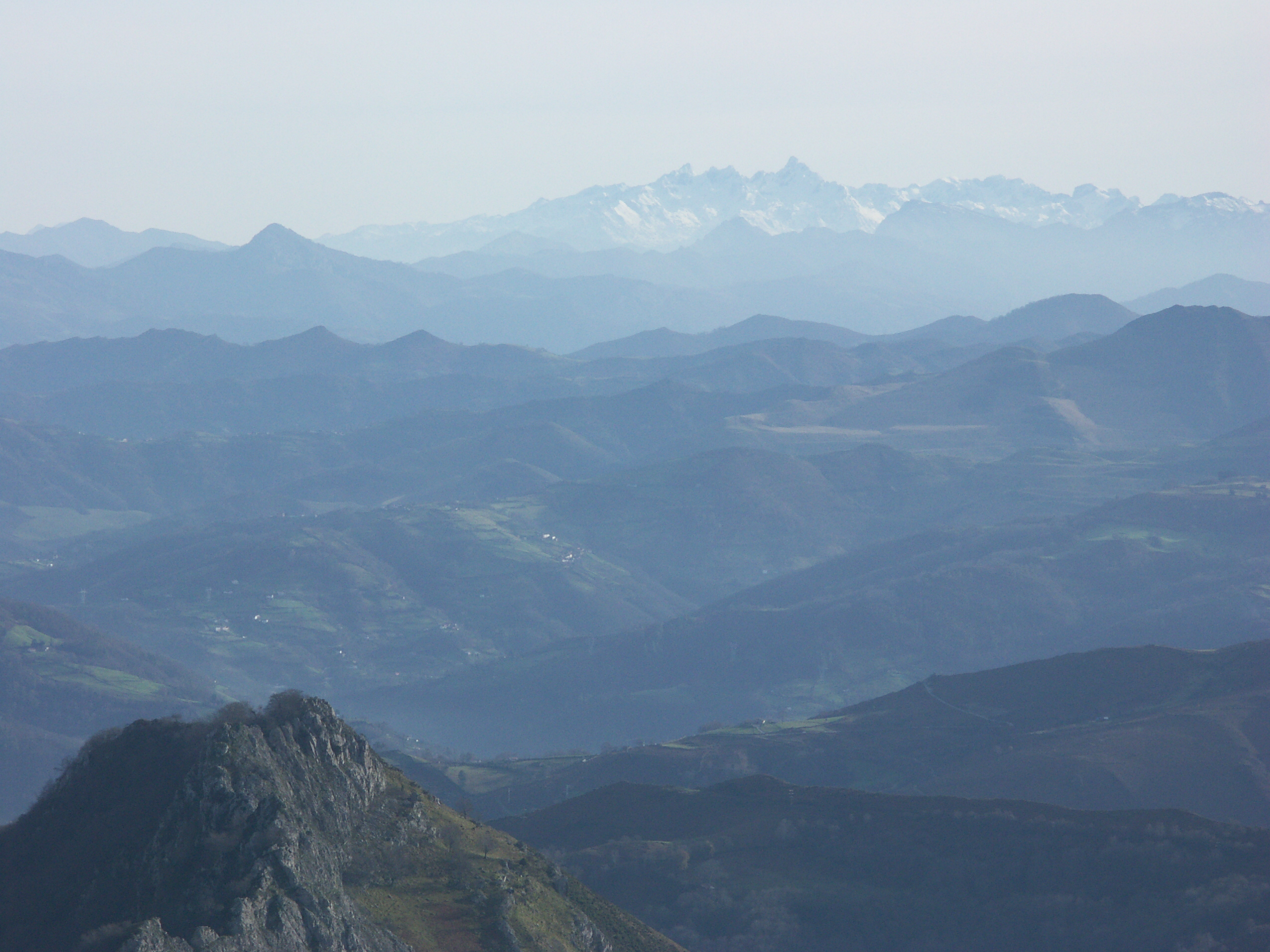 Los Picos de Europa desde el Monsacro, en el centro de Asturias